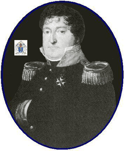 JG van Sytzama, oprichter van het Regiment Huzaren van Sytzama